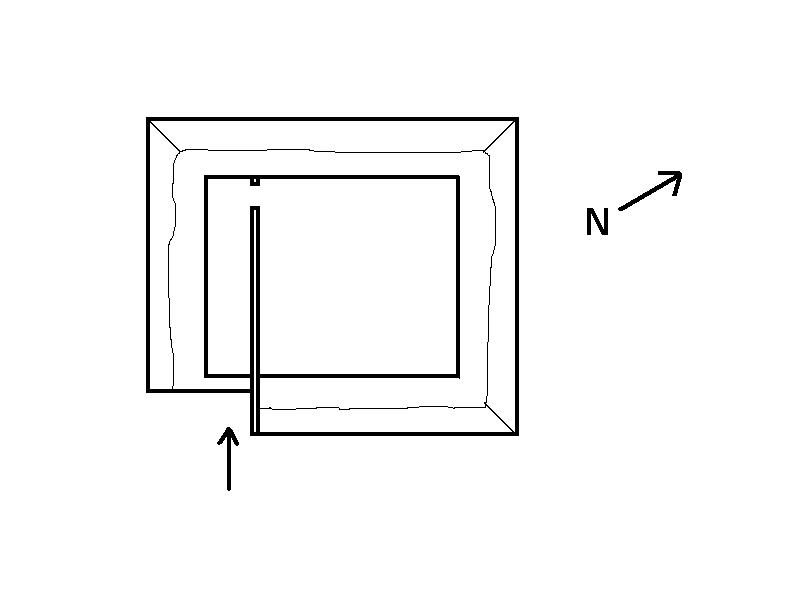 Grundriss der Pyramide von Hellinikon (schematische Darstellung)